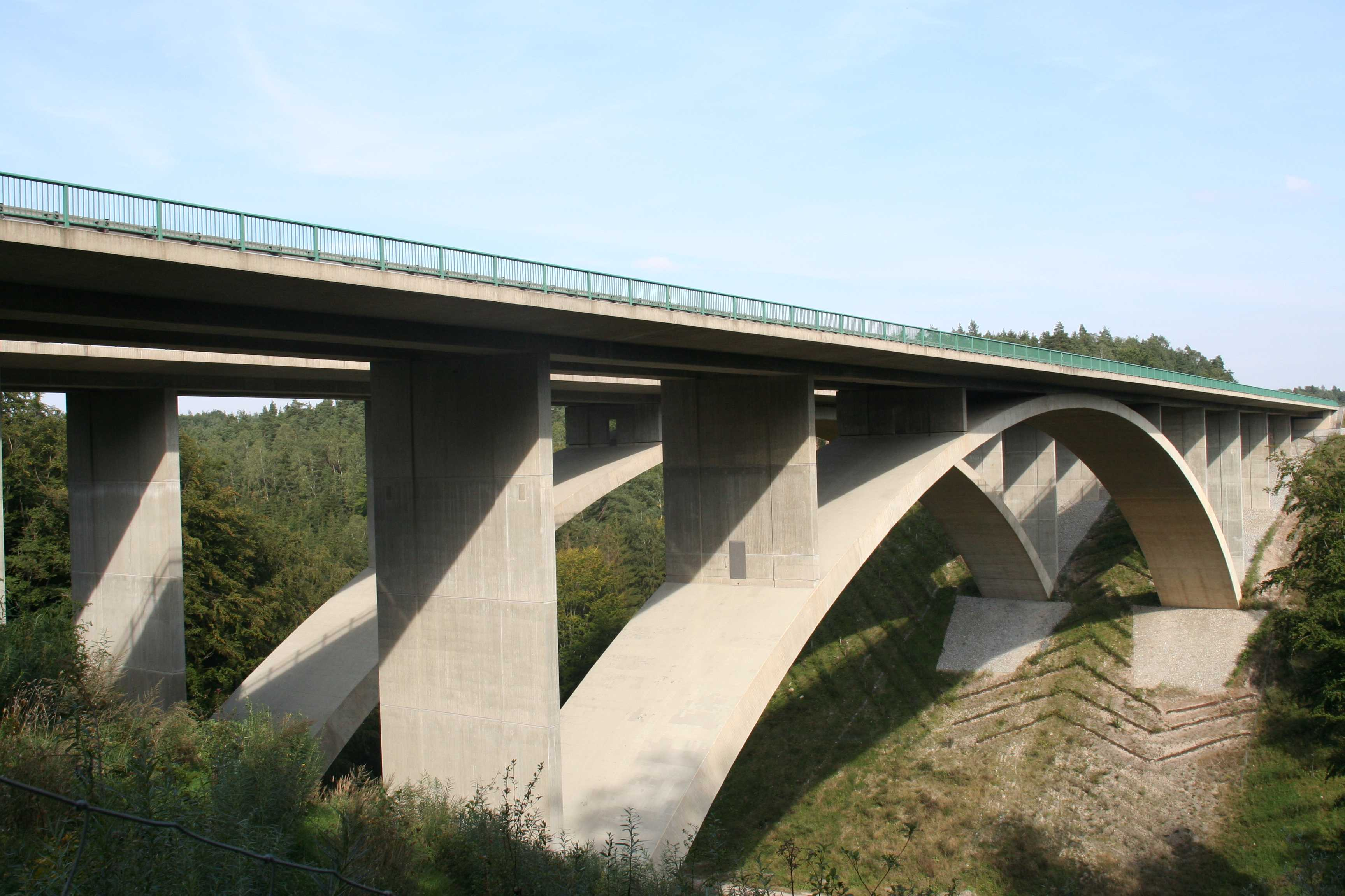 Teufelstalbrücke Bundesautobahn A4 bei Hermsdorf, Thüringen